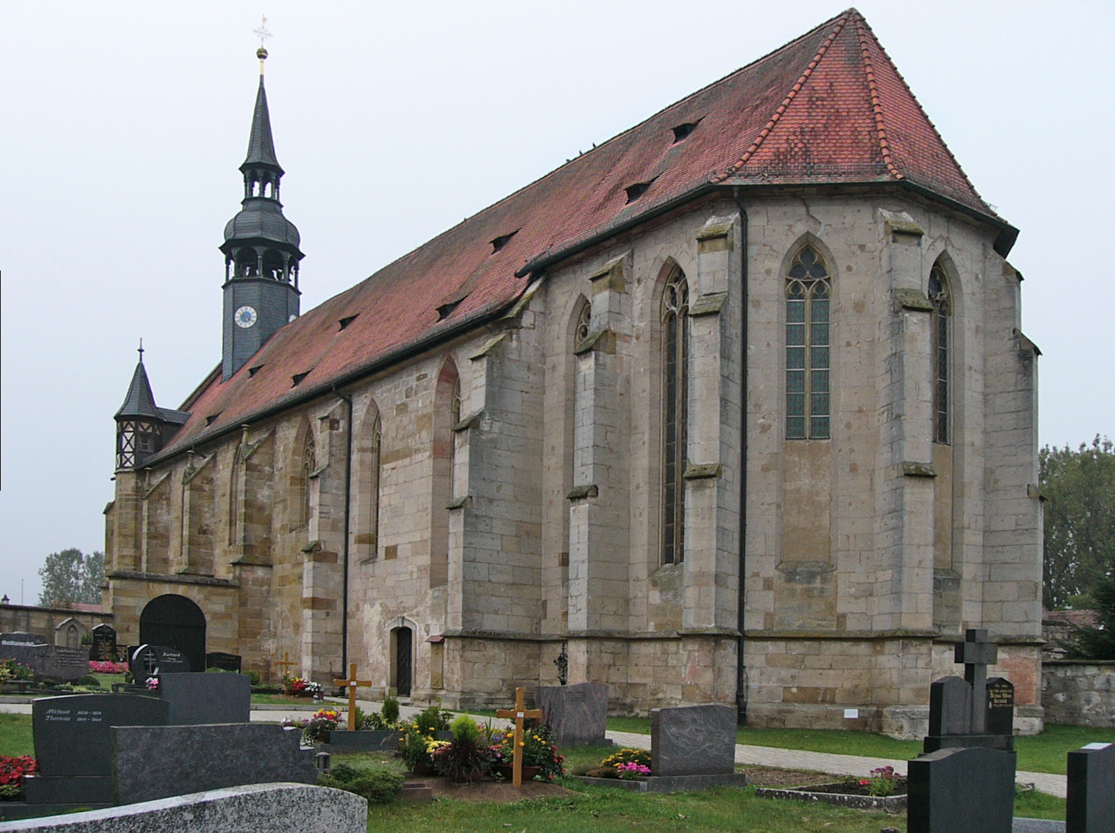 Klosterkirche Schlüsselau, heute Wallfahrtskirche